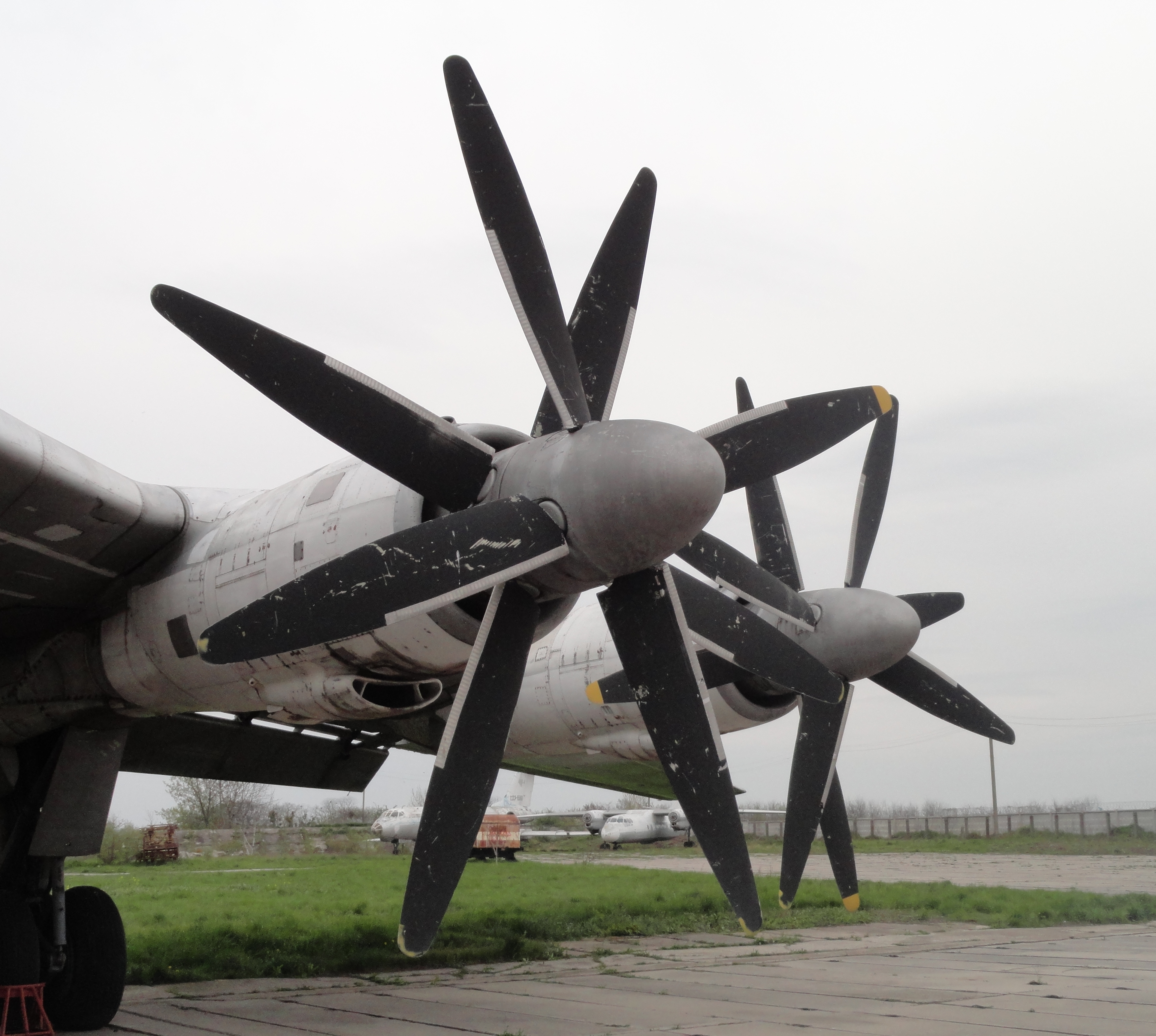 Воздушные винты самолёта Ту-142. Фото сделано в музее авиации в г. Киеве.